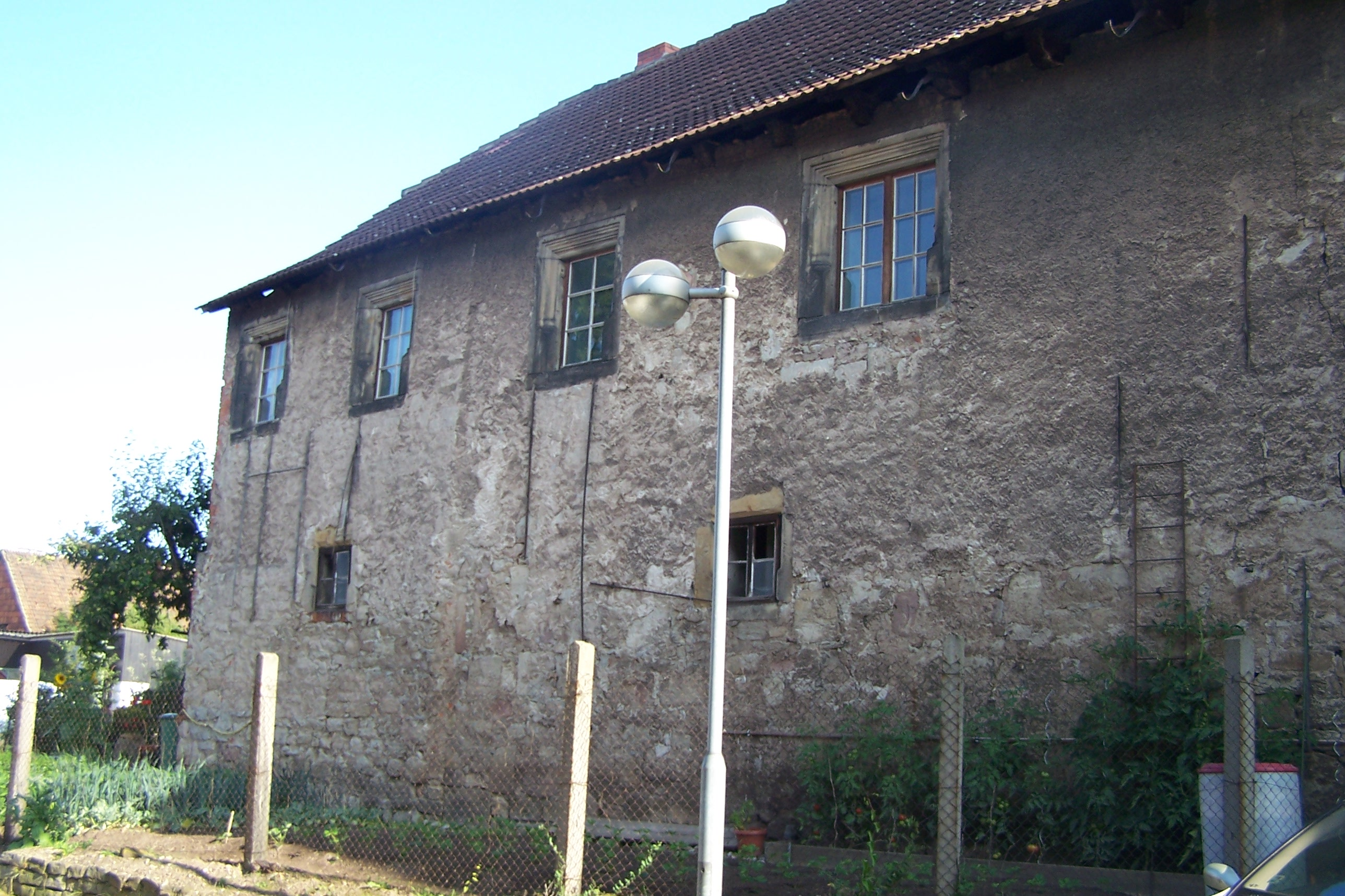 GTH Mechterstädt, Kemenate, Südfassade